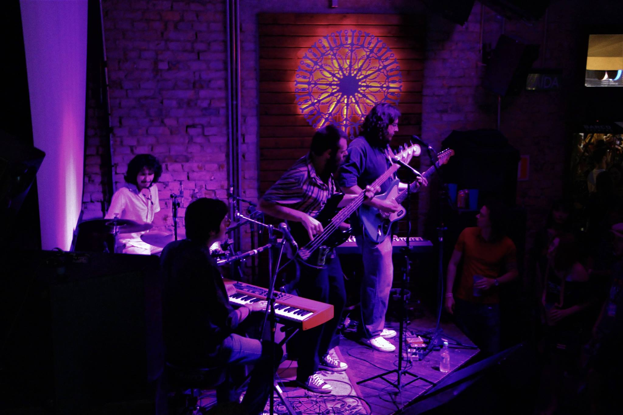 Show da banda não Alimente os Animais no Mississipi Delta Blues Festival 2016 - 054 Stage